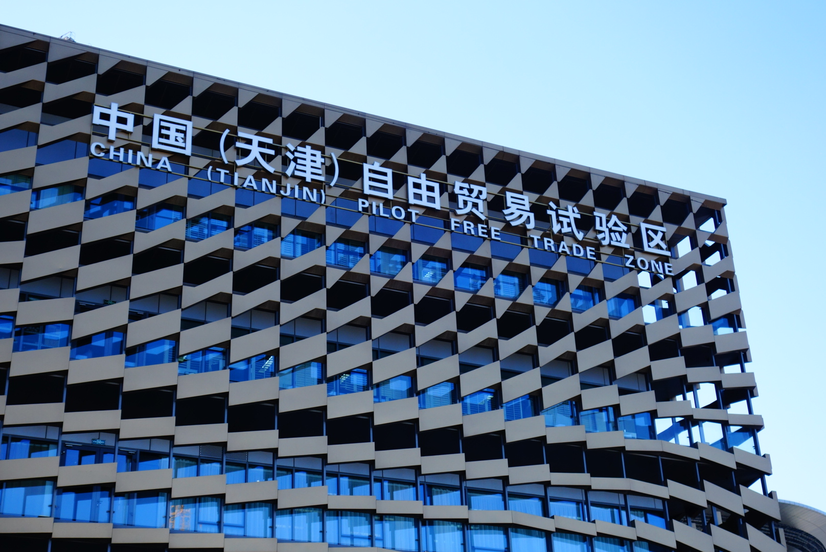 中文（中国大陆）: 中国（天津）自由贸易试验区滨海新区中心商务片区管委会